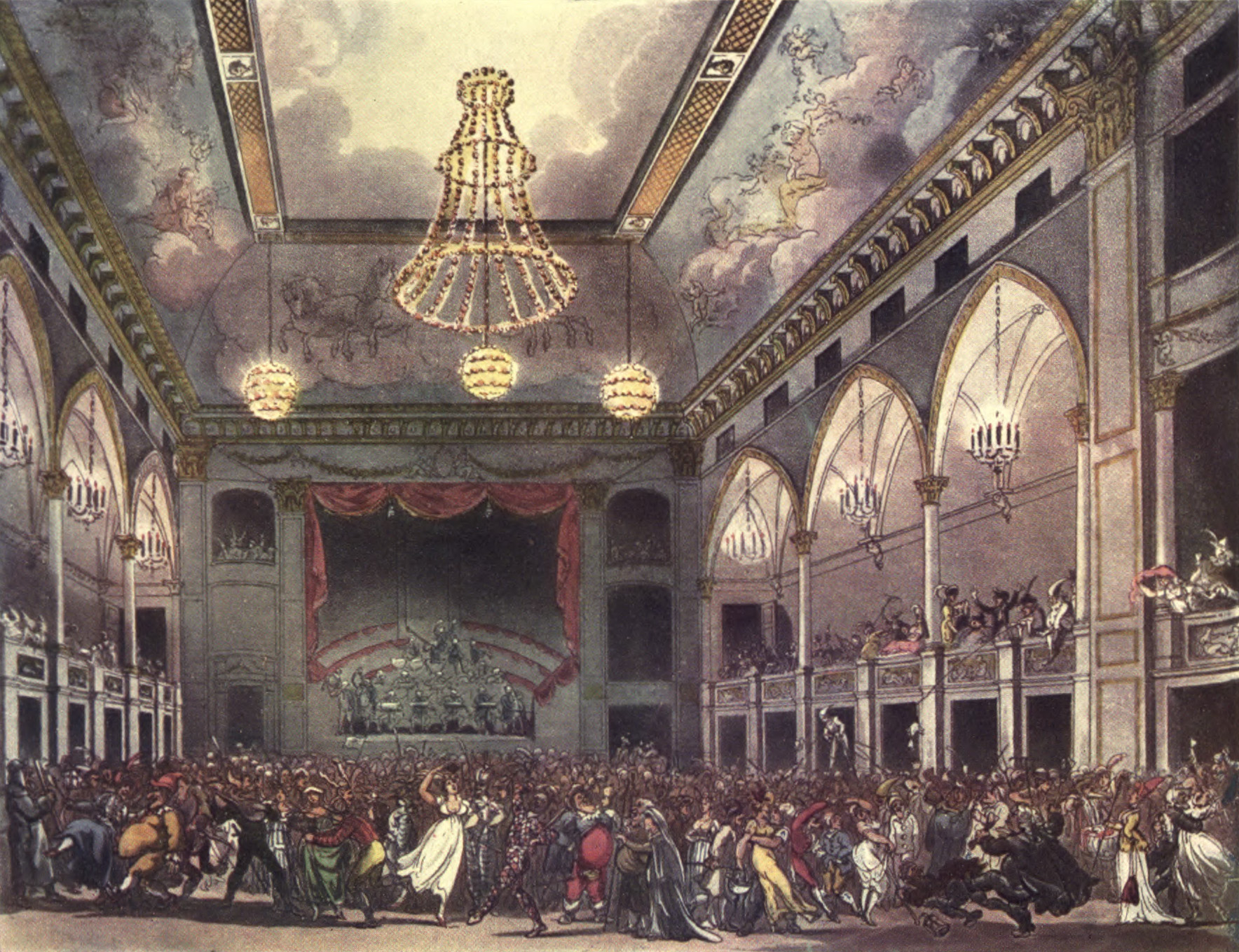 Pantheon Masquerade